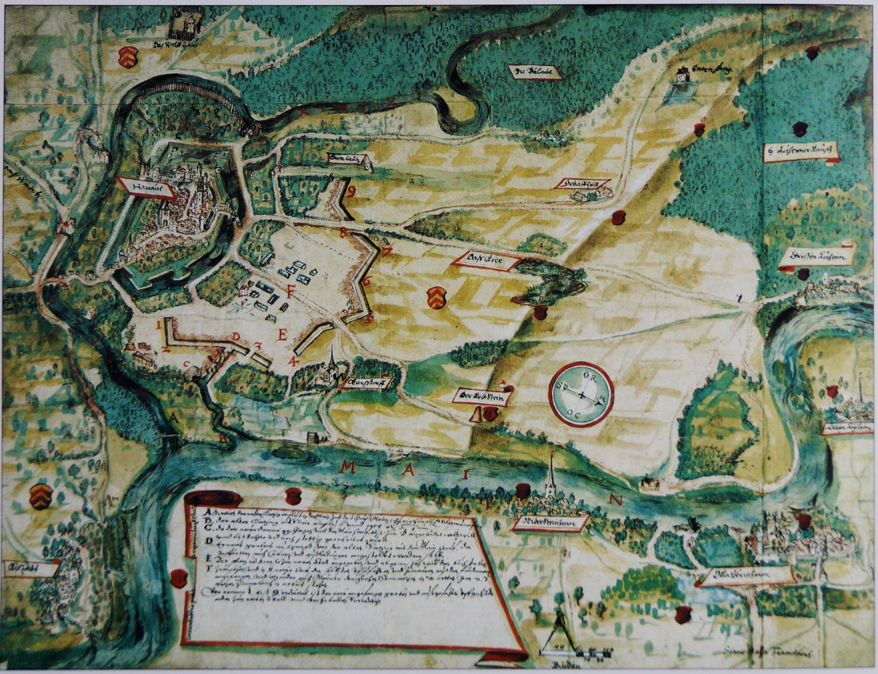 Grenzverlauf zwischen dem Erzbistum Mainz und der Grafschaft Hanau, gezeichnet wegen rechtlicher Auseinandersetzungen anlässlich der Gründung der Neustadt Hanau (Bildmitte), Staatsarchiv Würzburg MZ Risse und Pläne 135/I